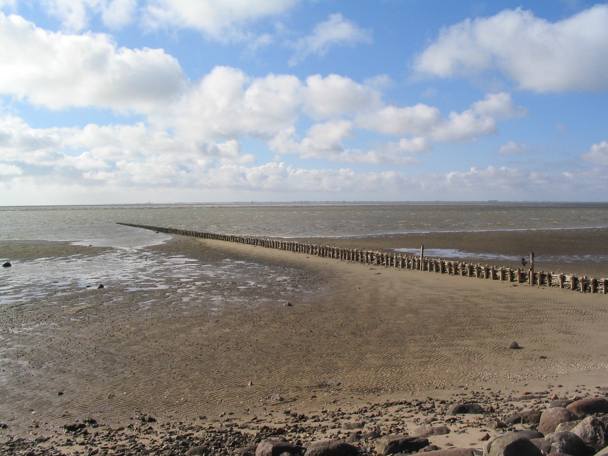 Lahnung on Nordstrand